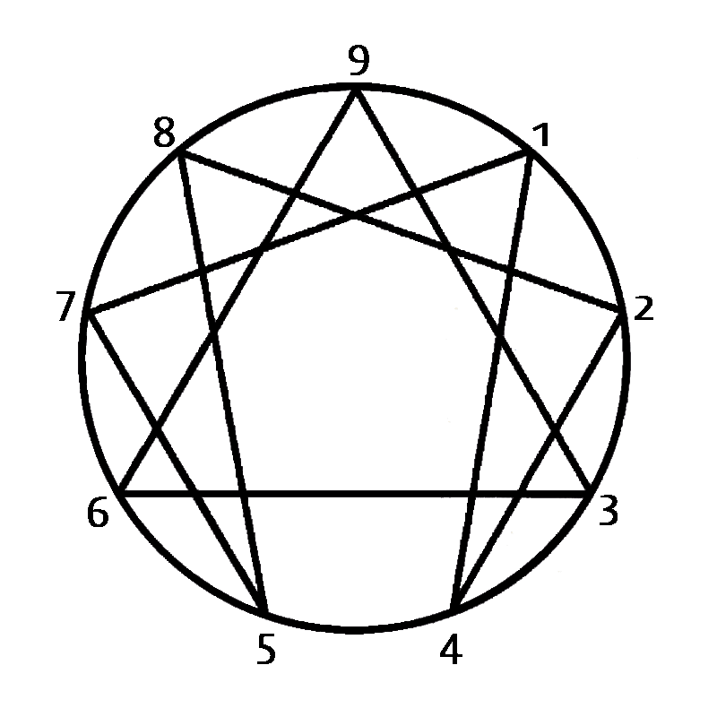 에니어그램